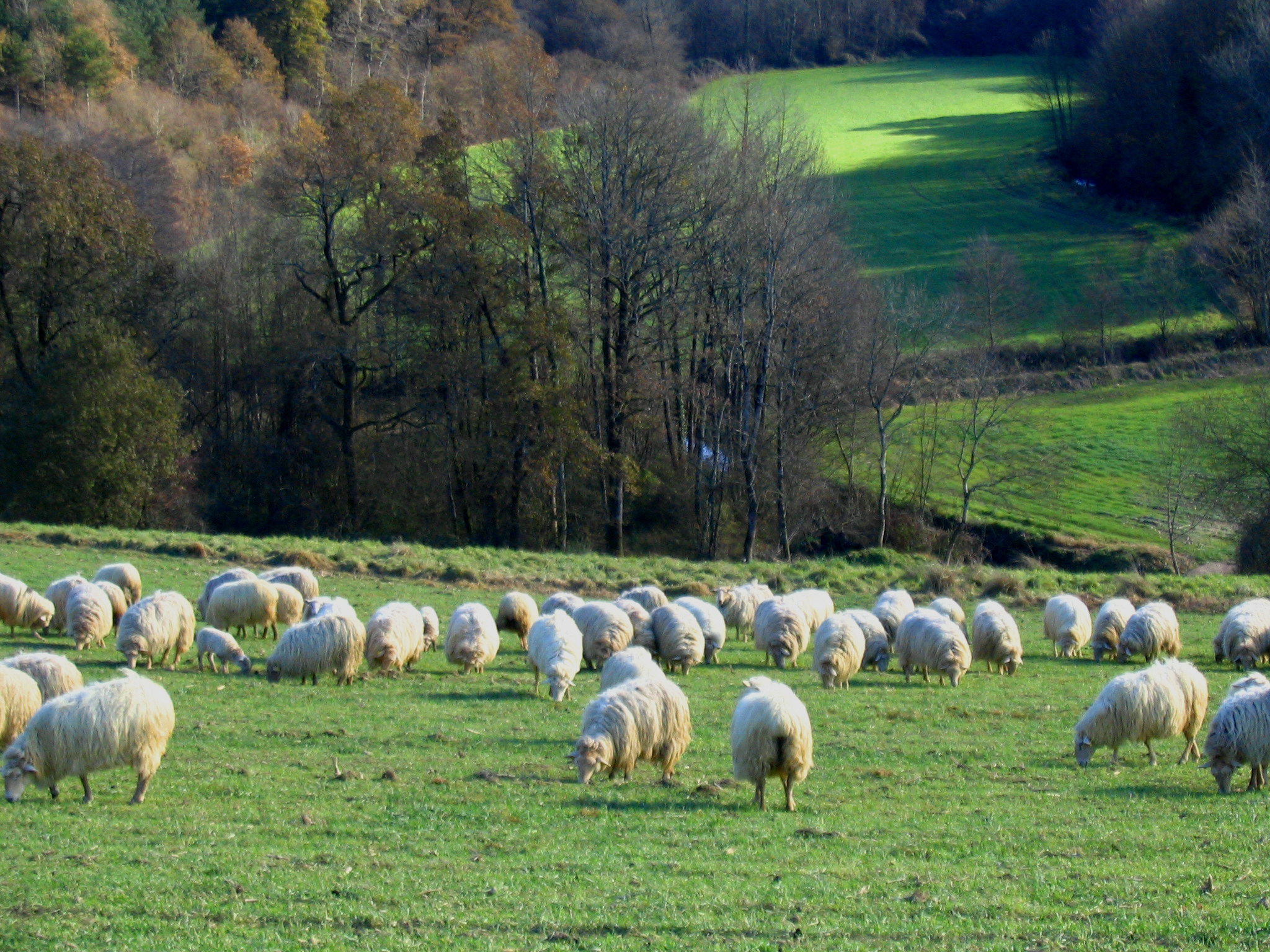 Troupeau de brebis dans le pays basque- Pyrénées Atlantiques - France Auteur/Author: P.Charpiat - 2006